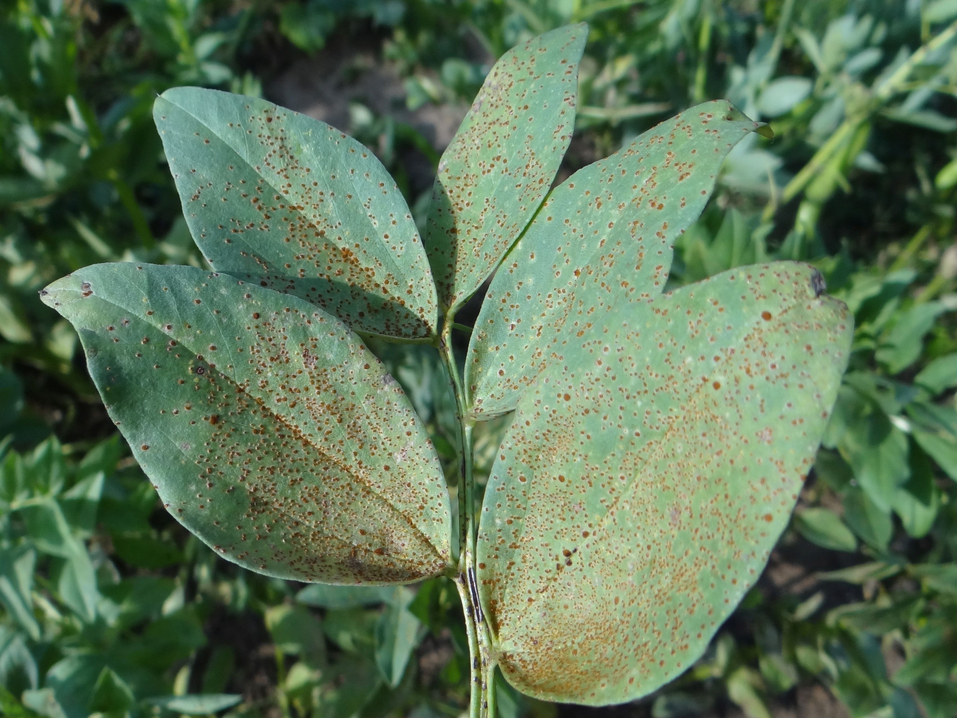 Uromyces viciae-fabae in Vicia faba